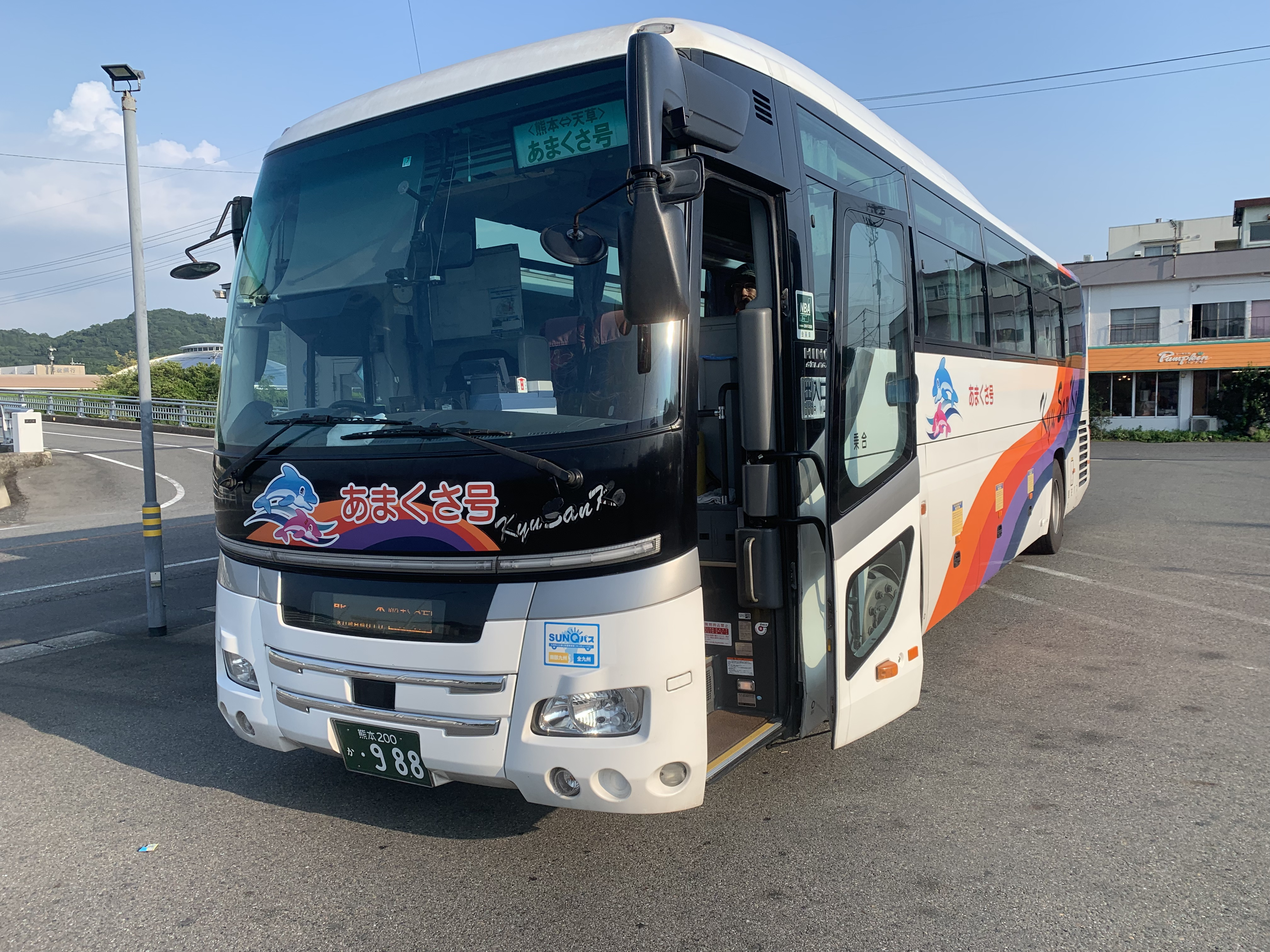 撮影場所：松島バス停